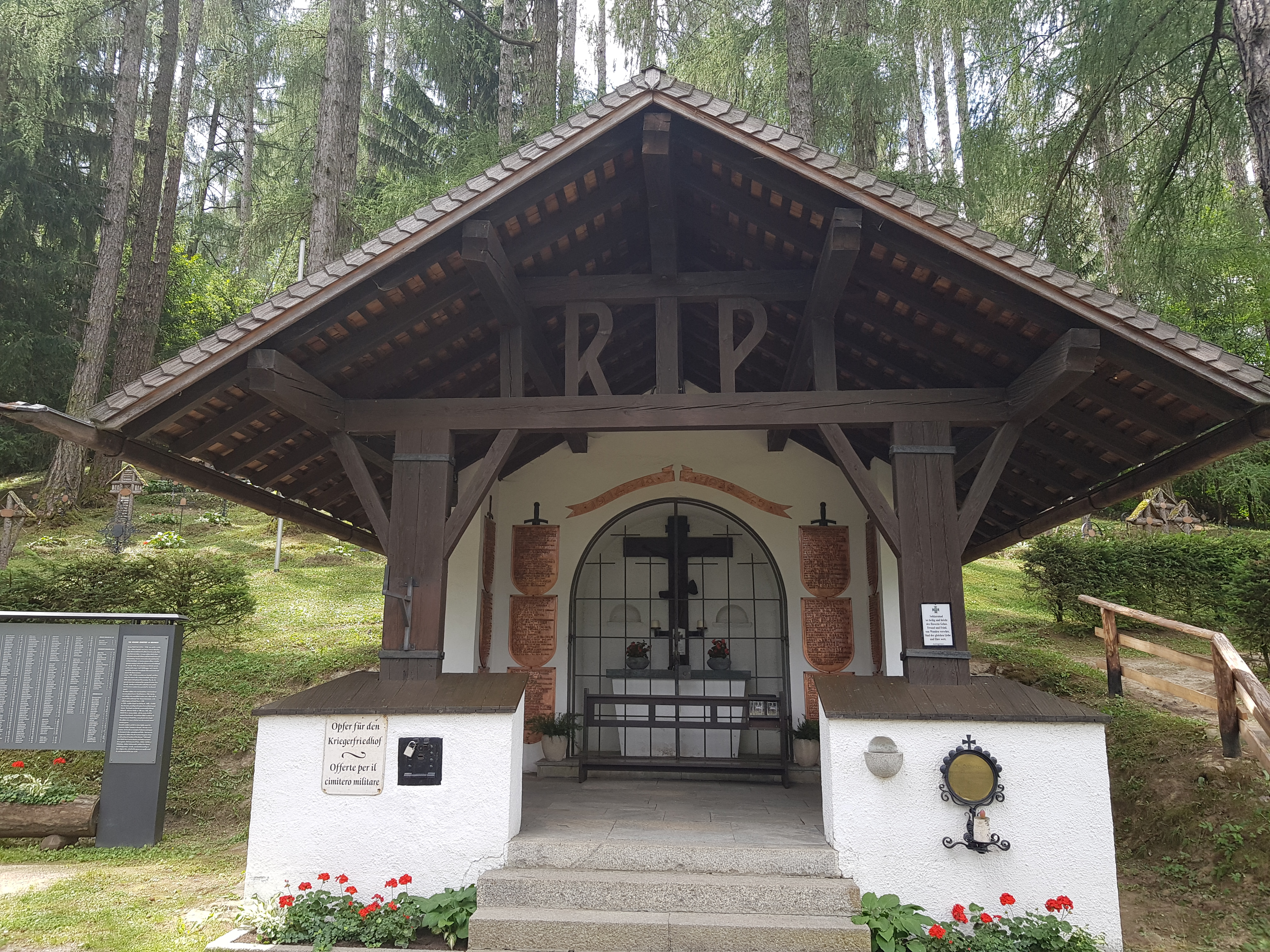 Kapelle (1915) am Waldfriedhof in Bruneck, Sürdtirol